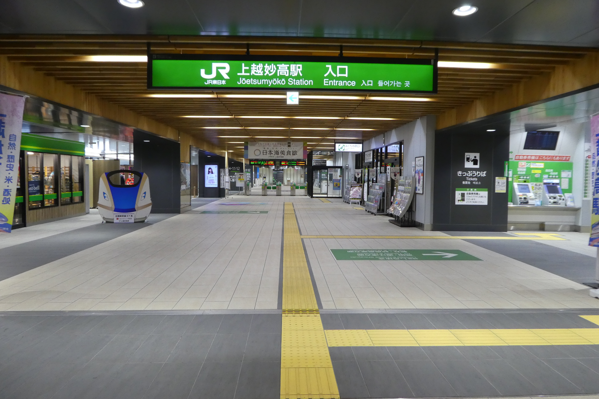 上越妙高駅、北陸新幹線改札前。